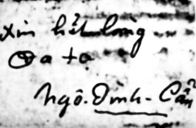 Bút tích của Ngô Đình Cẩn